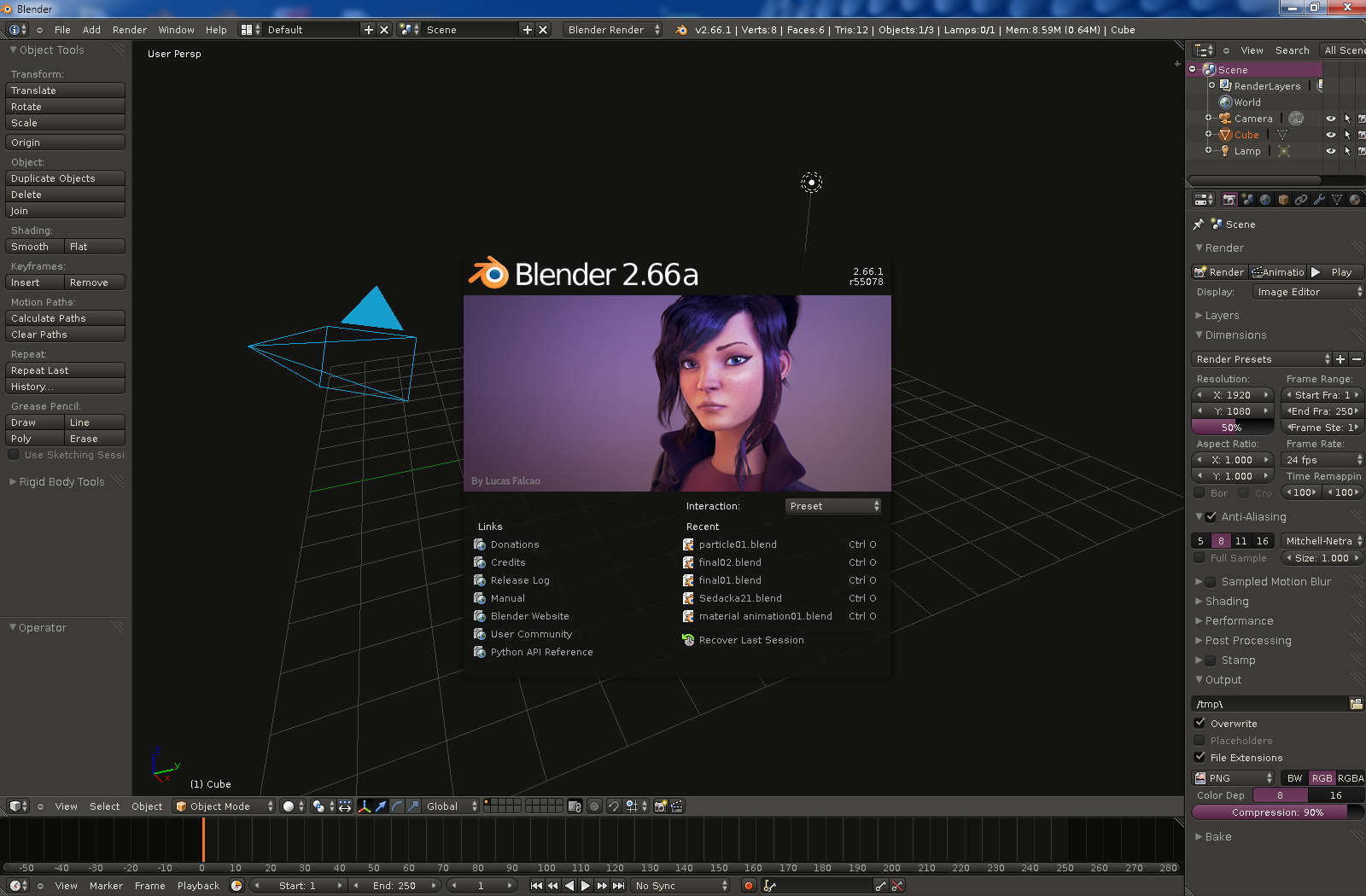 Základní rozvržení uživatelského prostředí v programu Blender 2.66a.